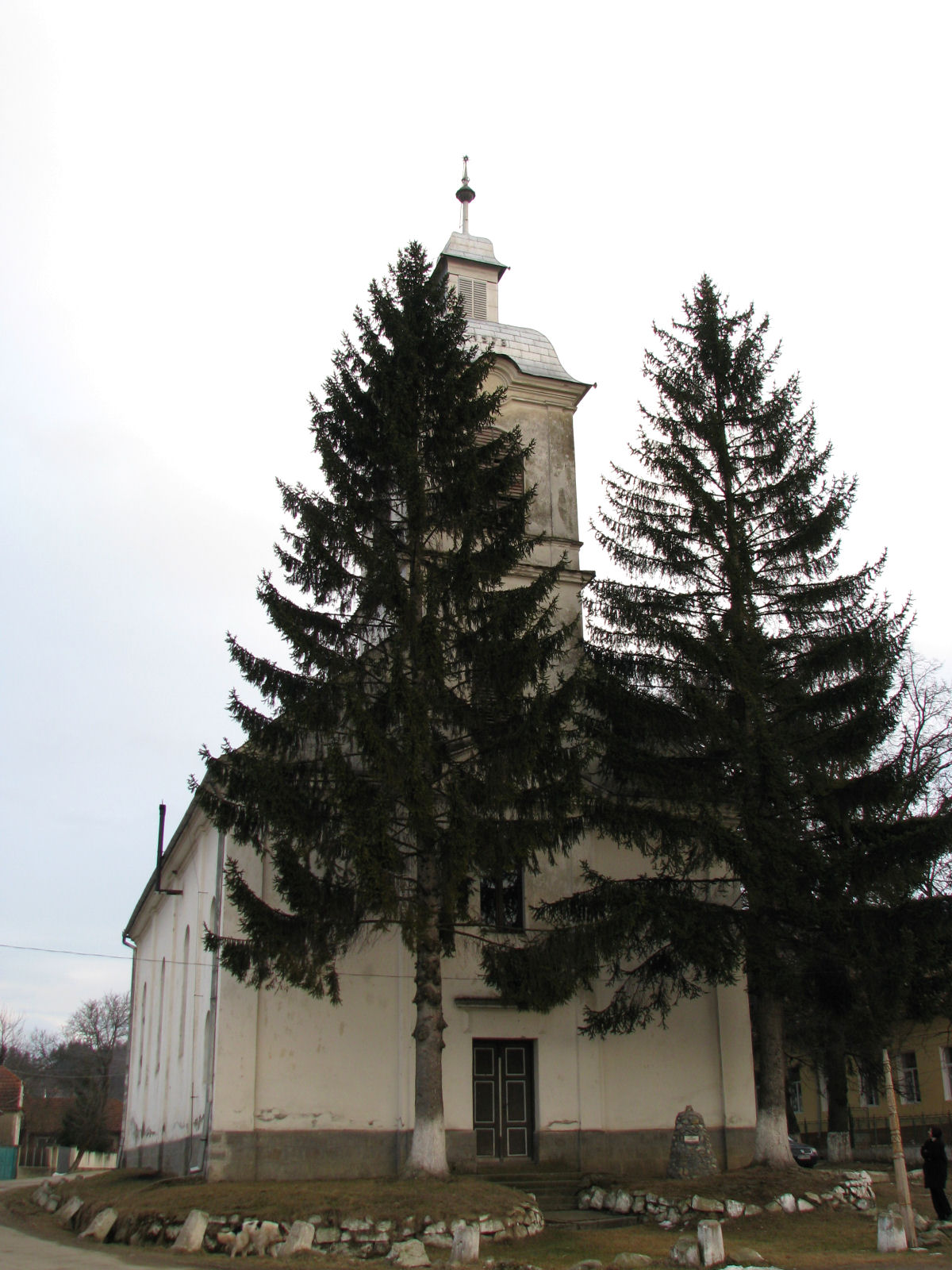 Keresztvári református templom